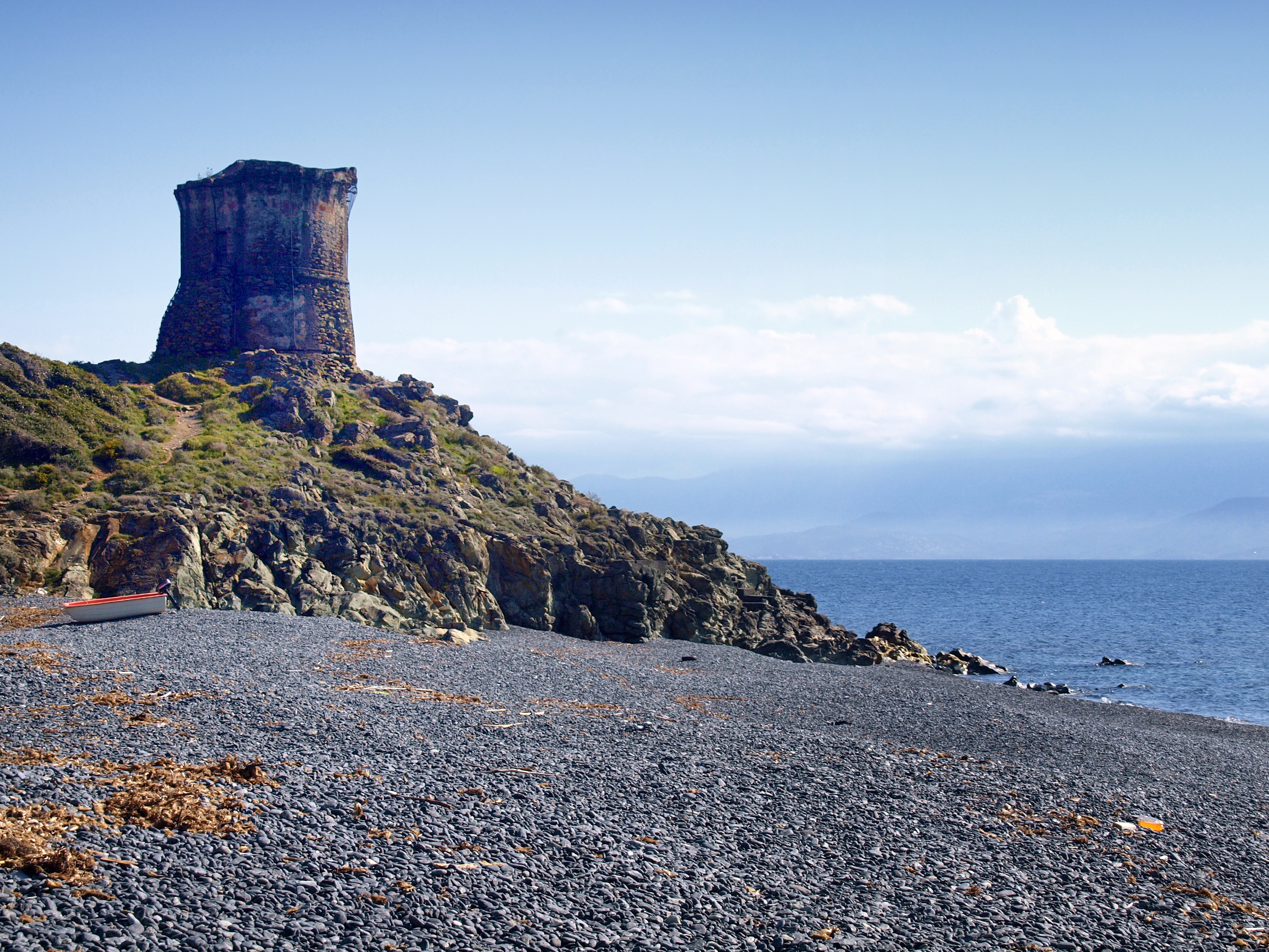 Ogliastro (Corsica) - Tour d'Albo